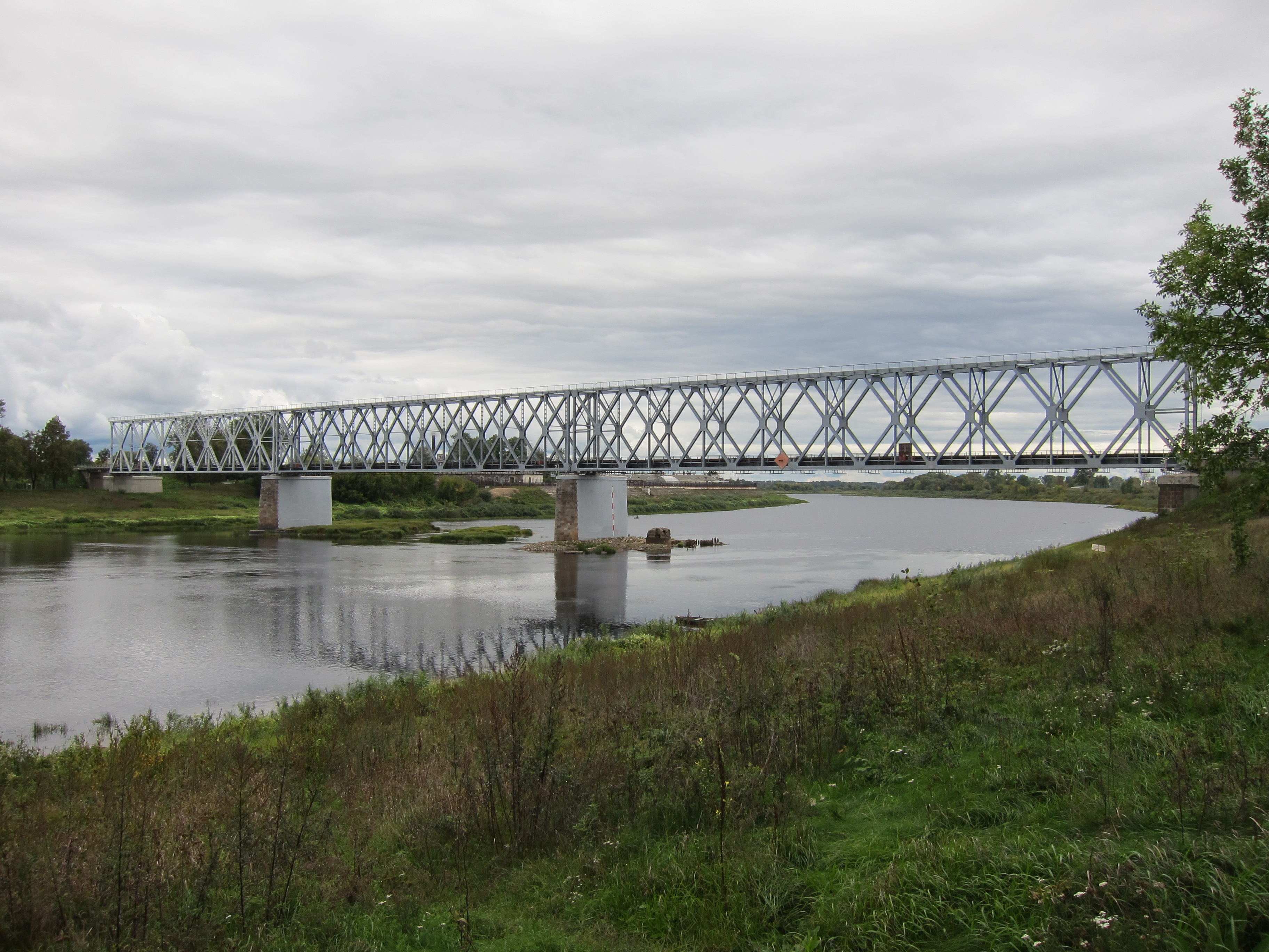 Daugavpils dzelzceļa tilts pār Daugavu.